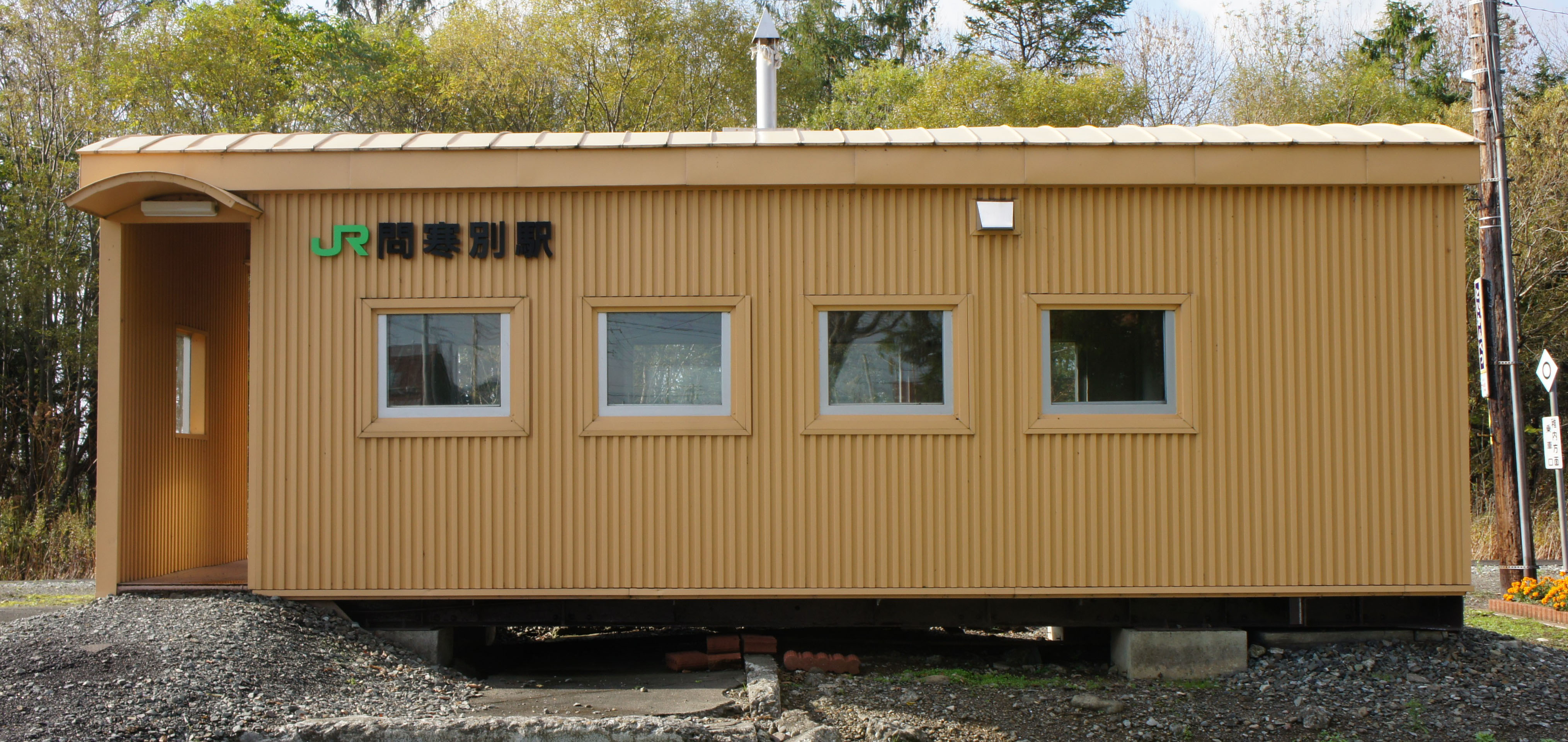 JR宗谷本線・問寒別駅の駅舎 Sony NEX-3